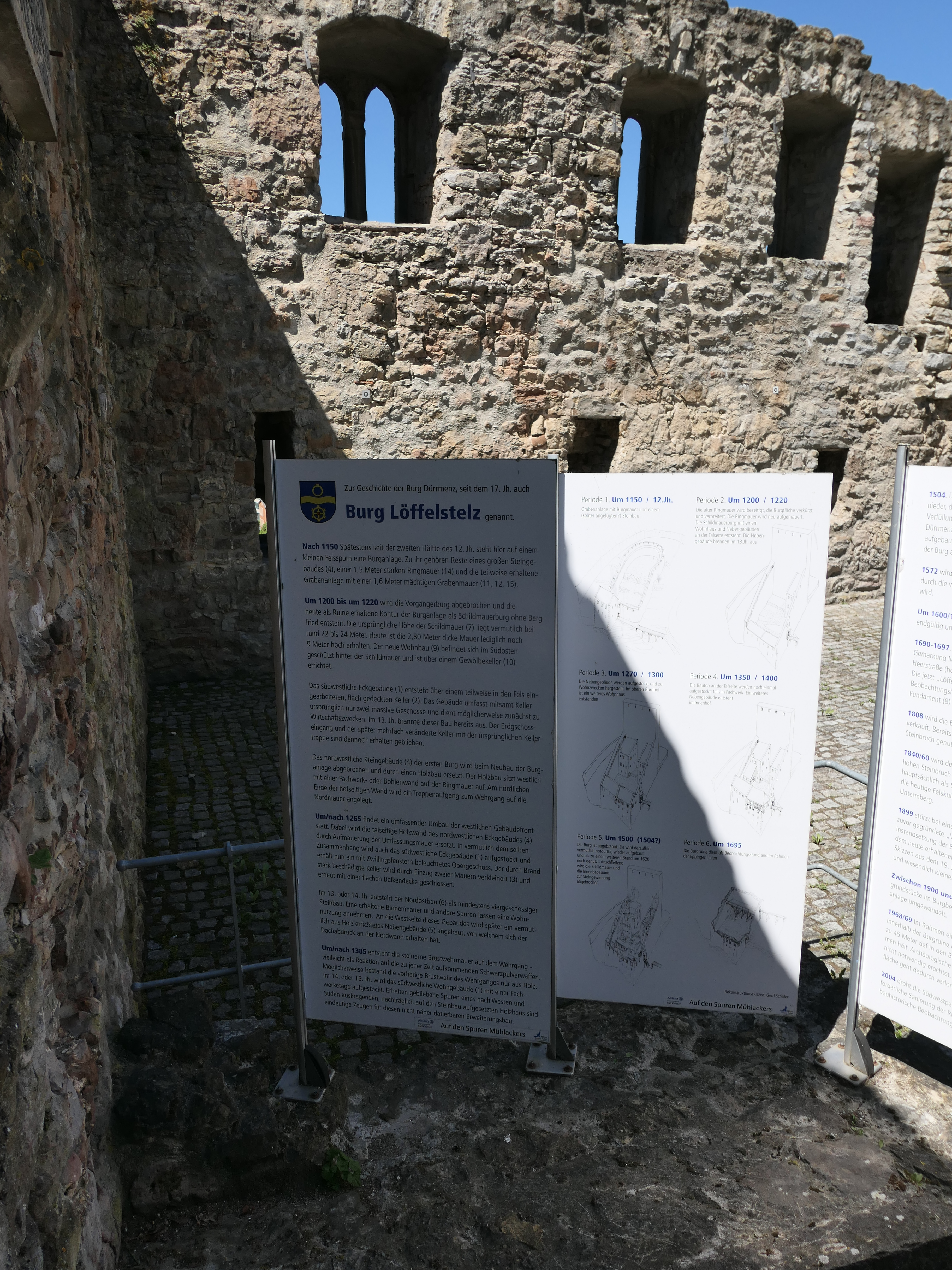 Burg Löffelstelz, Dürrmenz Tafel